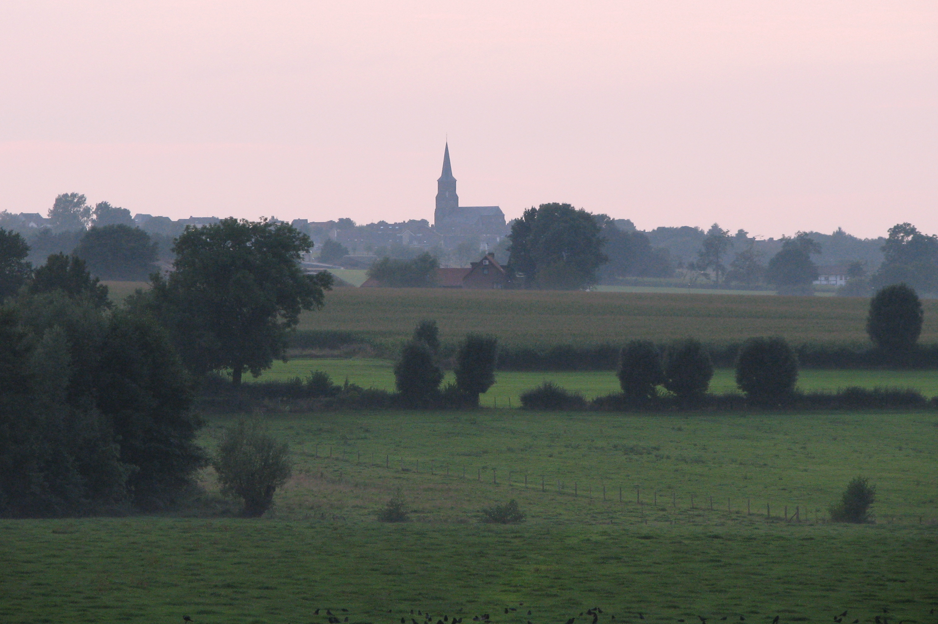 Zicht op Vijlen in de provincie Zuid-Limburg